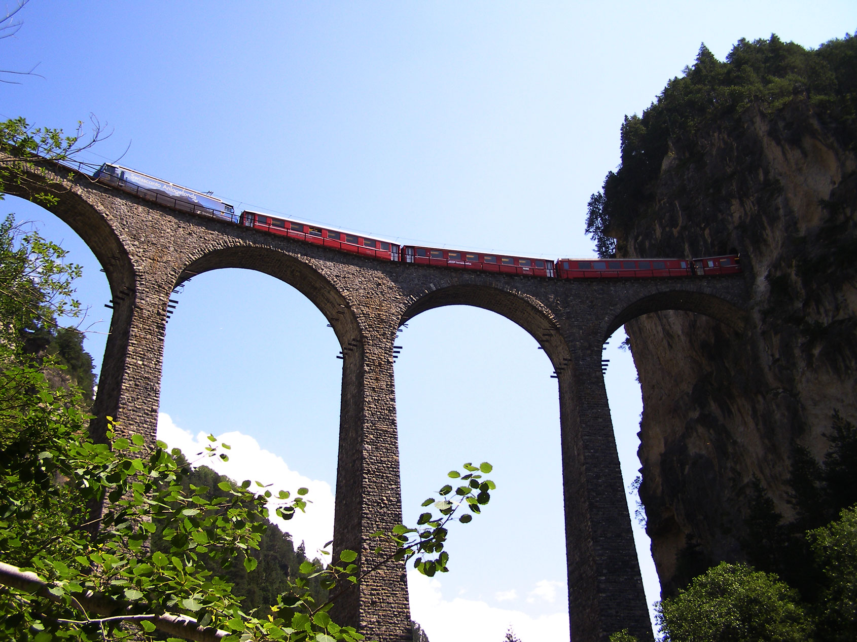 Landwasserviadukt Rumantsch: Viaduct da la Landwasser